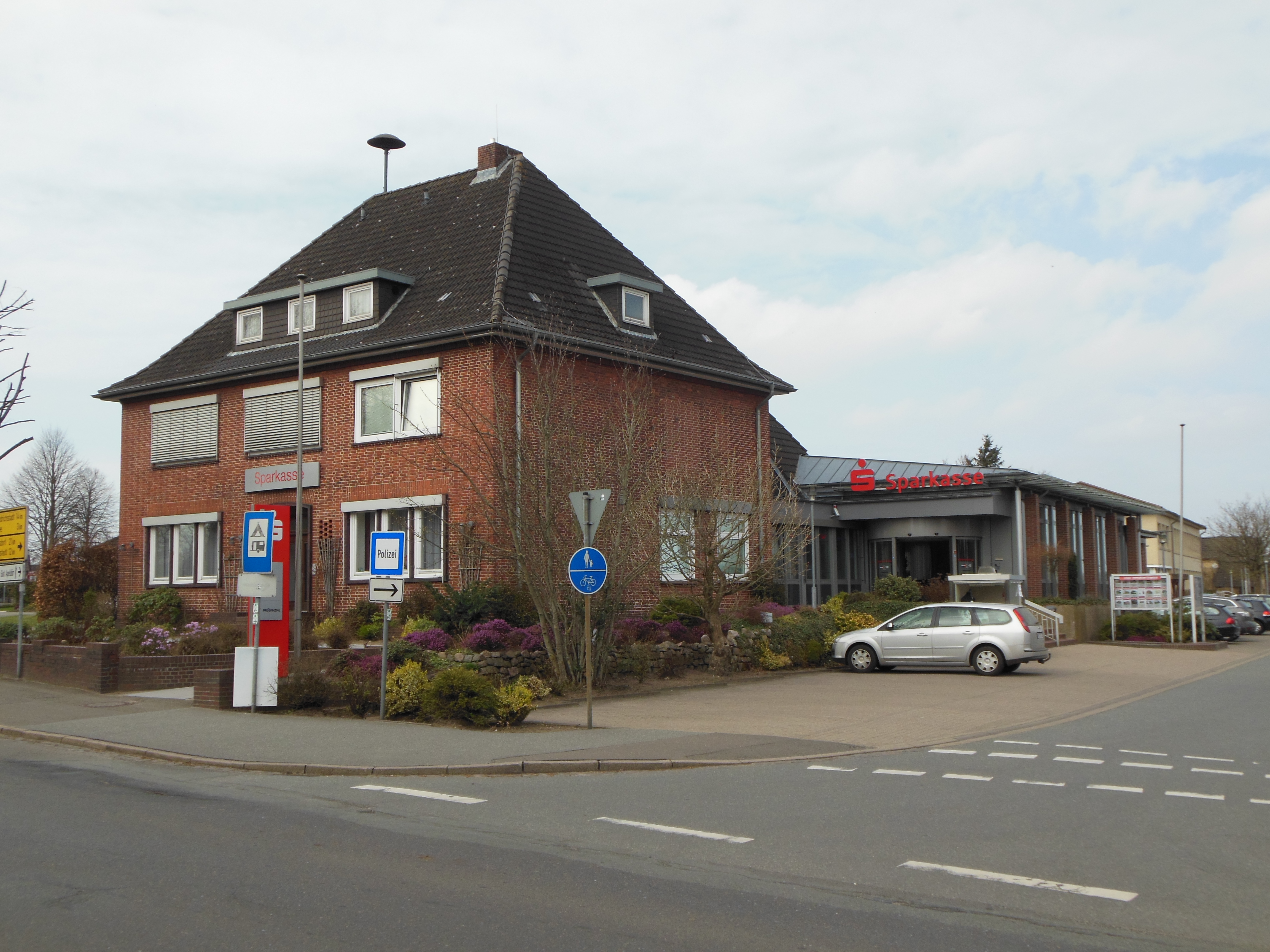 Hauptstelle Hennstedt der Sparkasse Hennstedt-Wesselburen, Mühlenstraße 18, 25779 Hennstedt, Deutschland